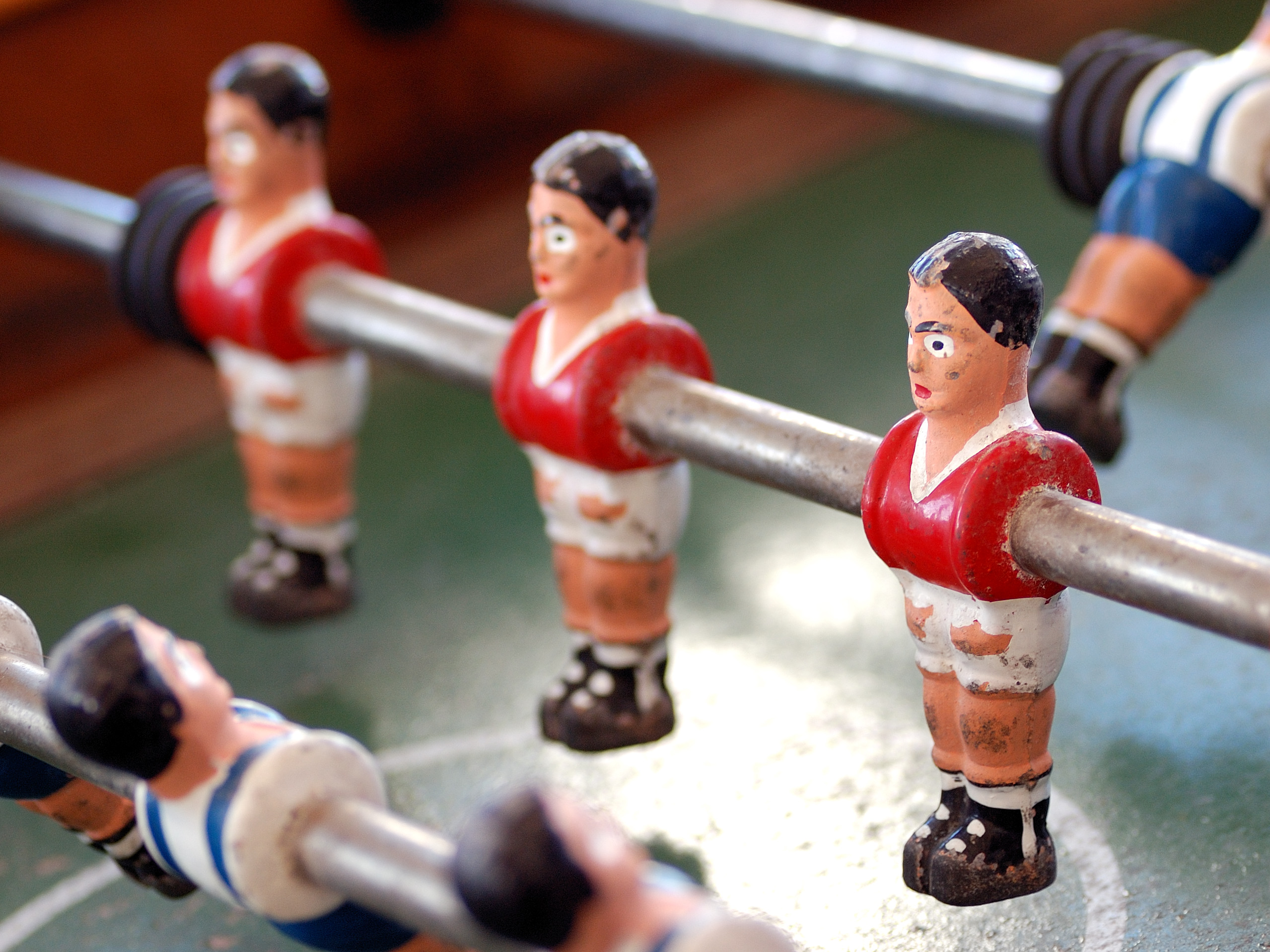 Azenha do Mar, Portugal [2009]